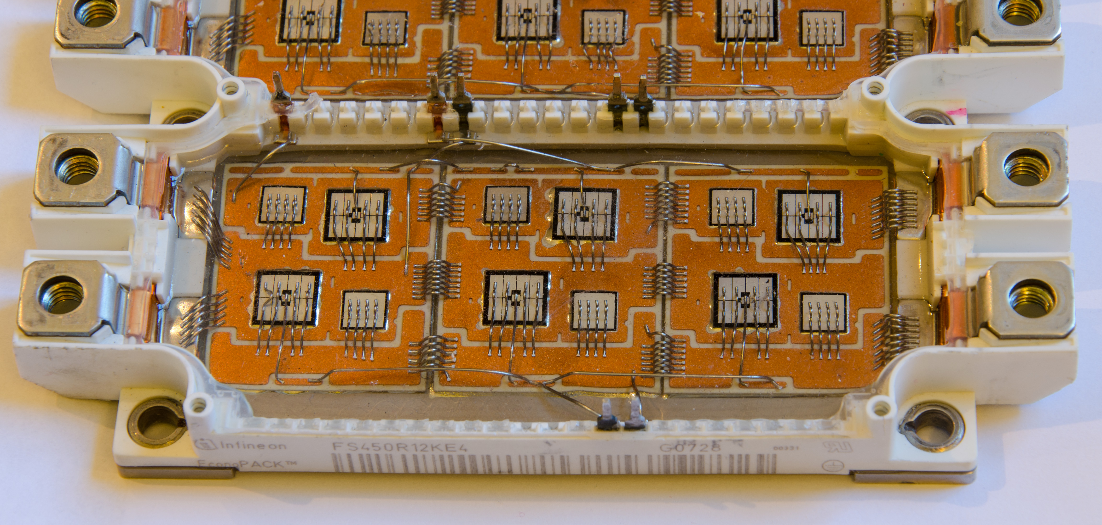 Infineon Econopack+ FS450R12KE4 (450A / 1200V)